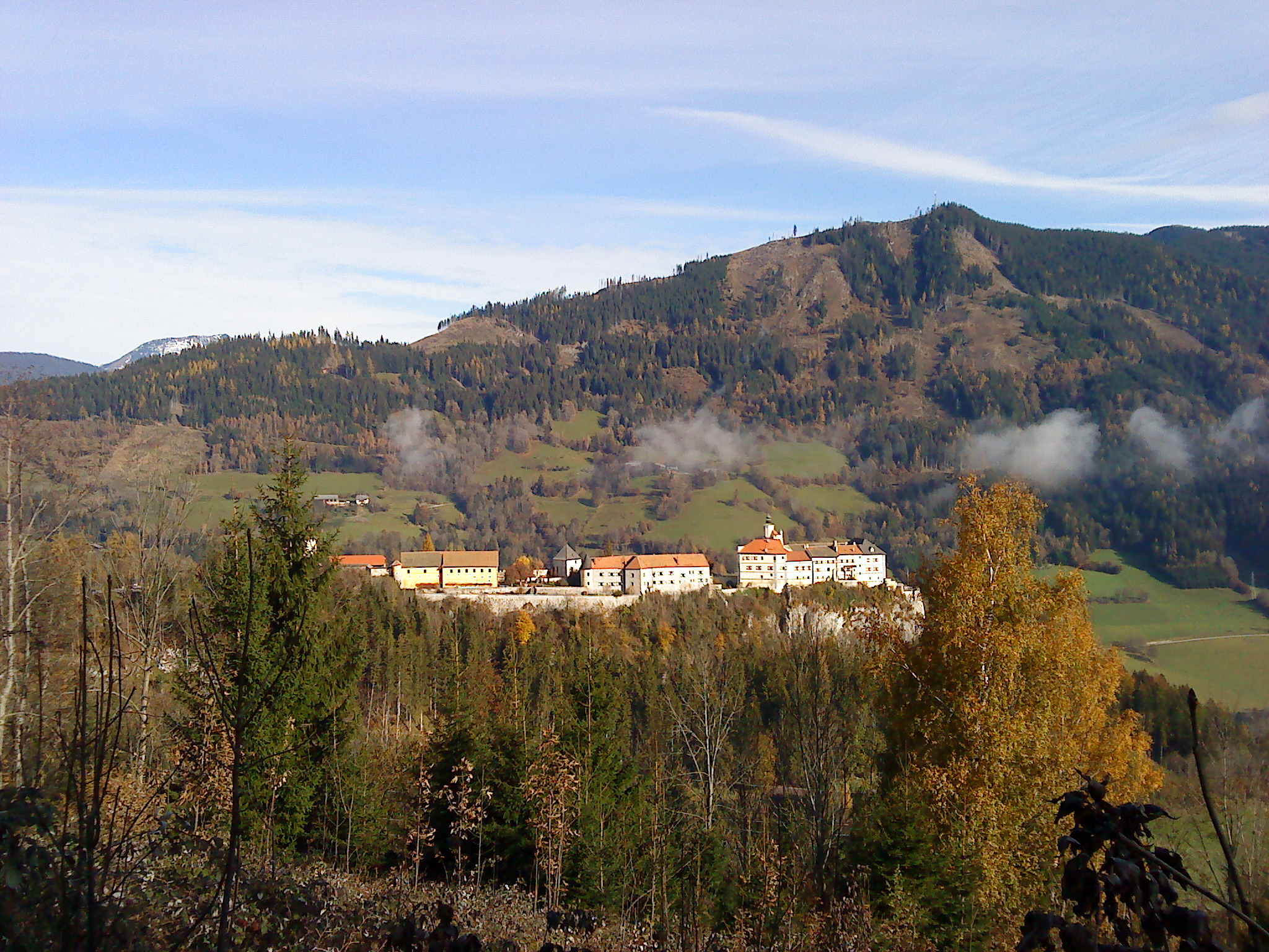 Burg Strechau, Oktober 2010